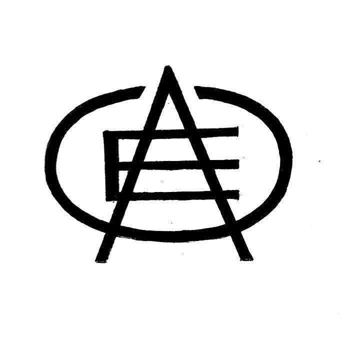 Et Andet Universitets logo